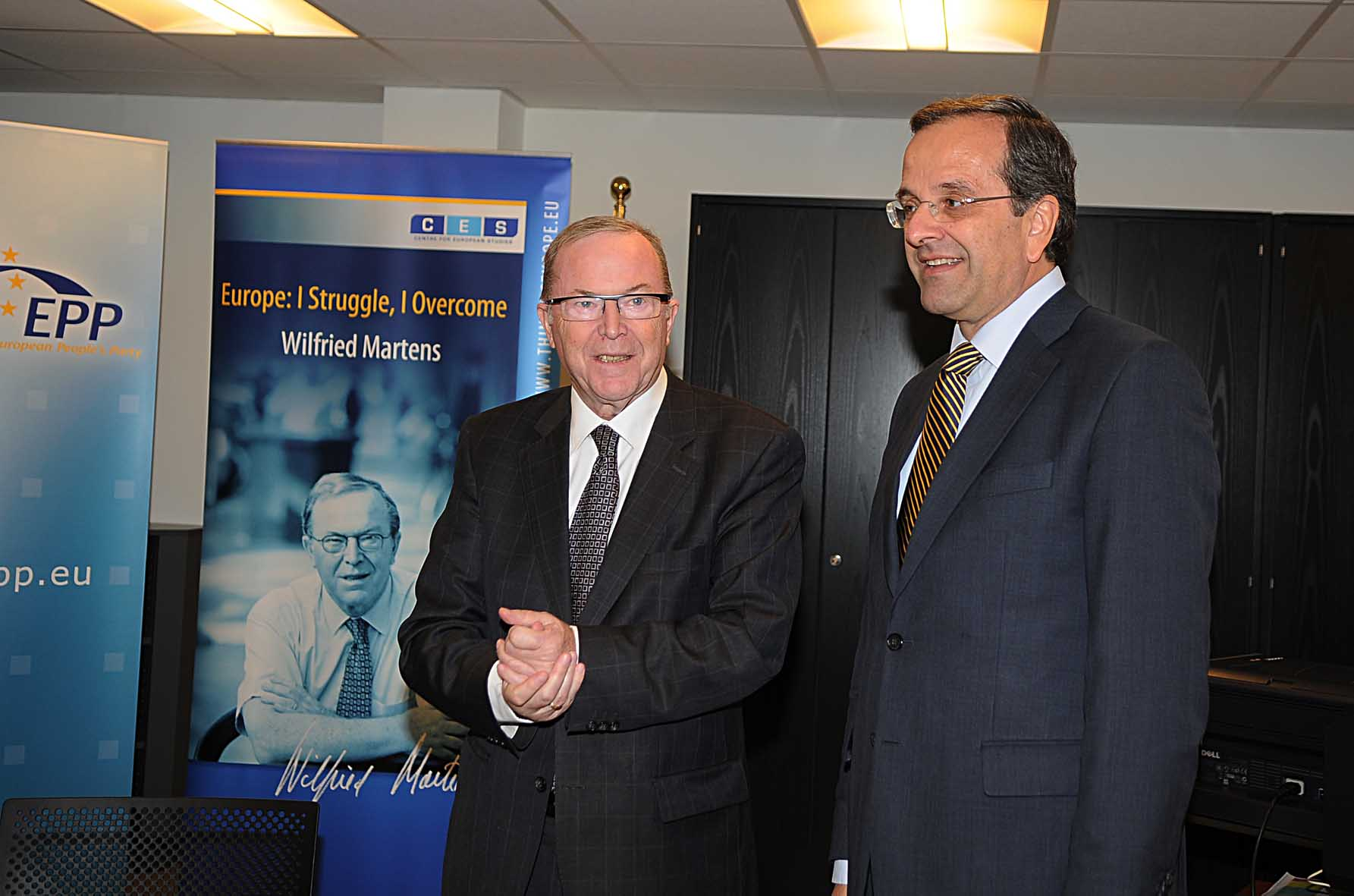 ANT.SAMARAS - MARTENS